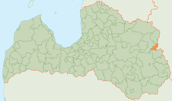 Karte von Baltinava